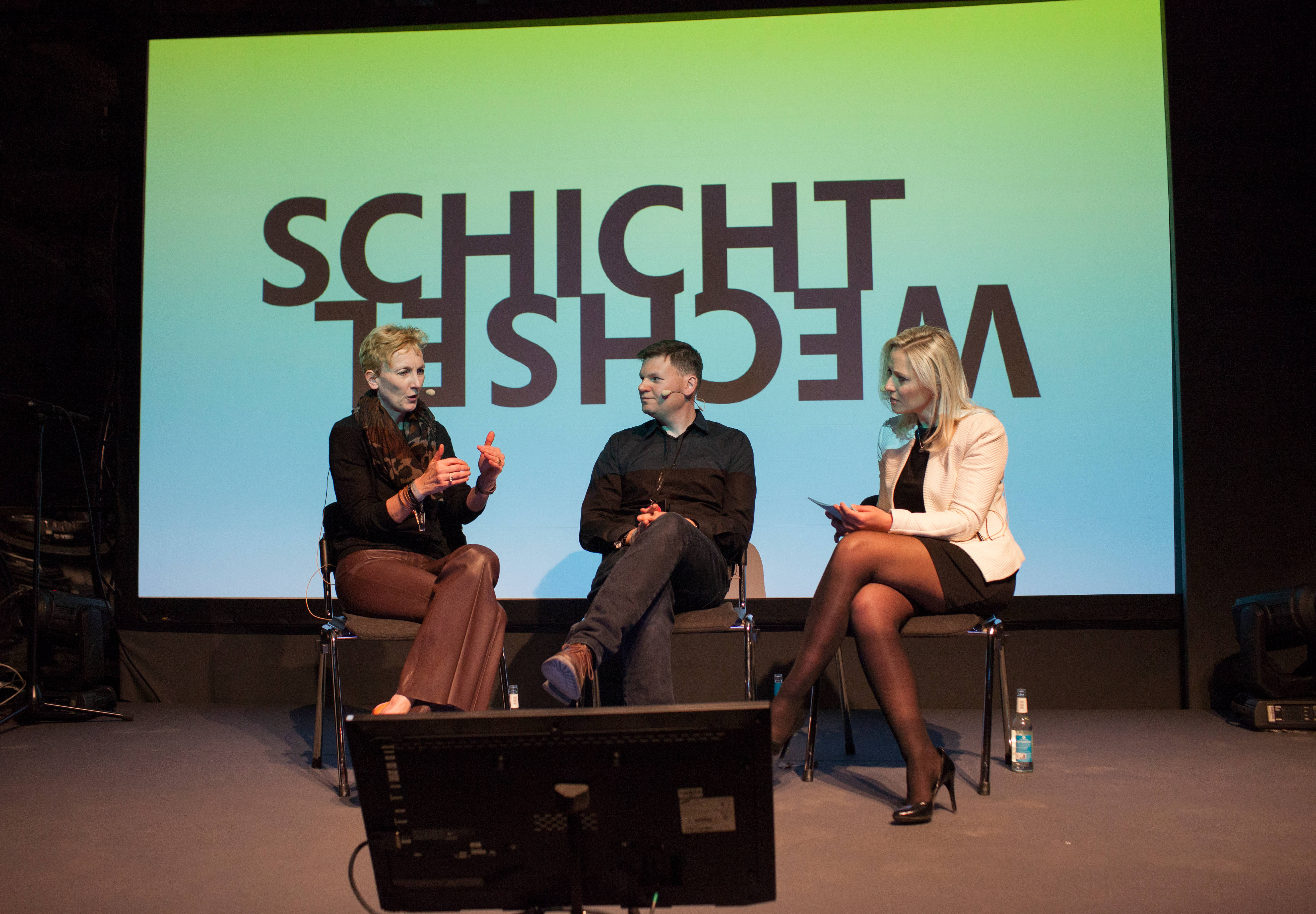 Sabine Bendiek, Stefan Heumann und Juliane Leopold in einer Podiumsdiskussion zum Thema "'Schichtwechsel: Hilfe, die Roboter kommen - Bedrohung, Invasion oder Chance?" am 02.05.2016 auf der re:publica in Berlin. Foto: re:publica/Jan Zappner CC BY 2.0